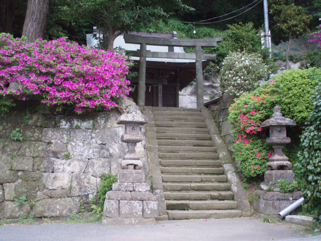 Kumano shrines, City of Kamakura, Pref. Kanagawa.